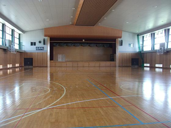 学校内：体育館